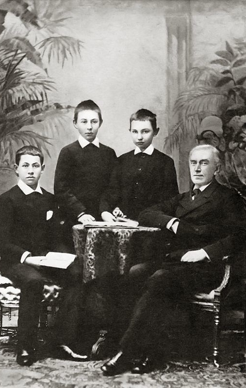 Sergei Rachmaninoff